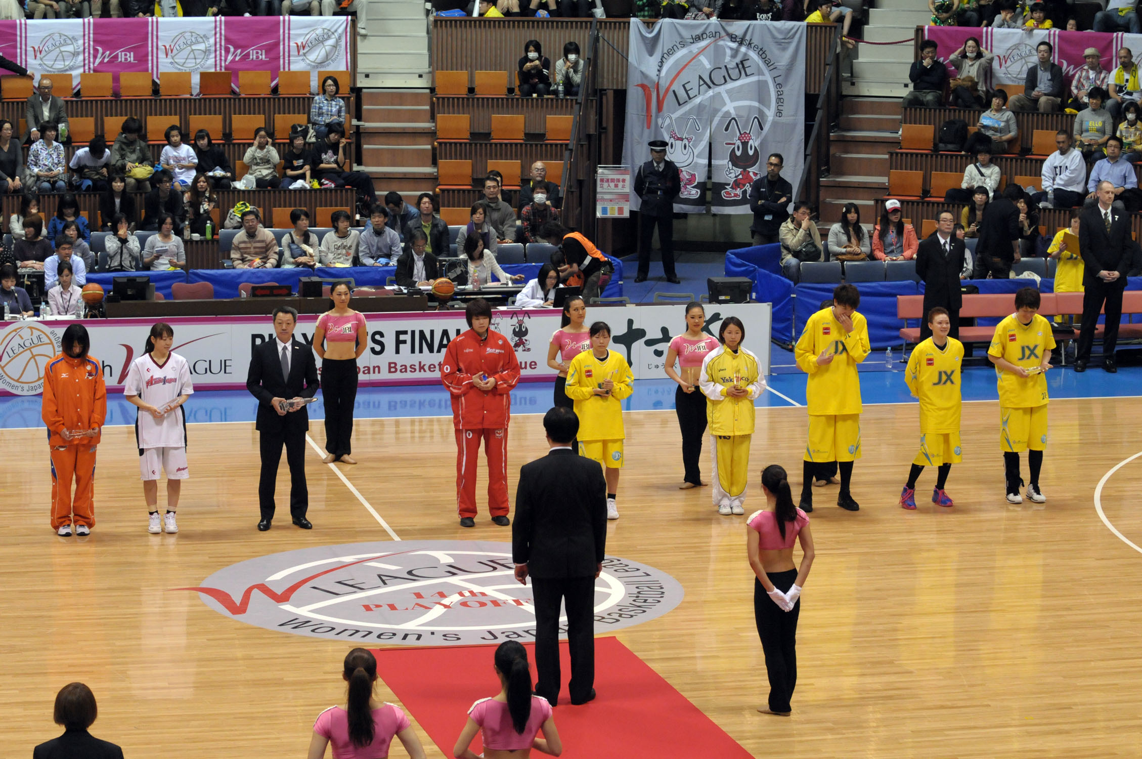 第14回Ｗリーグ アウォード表彰。代々木第二体育館で。